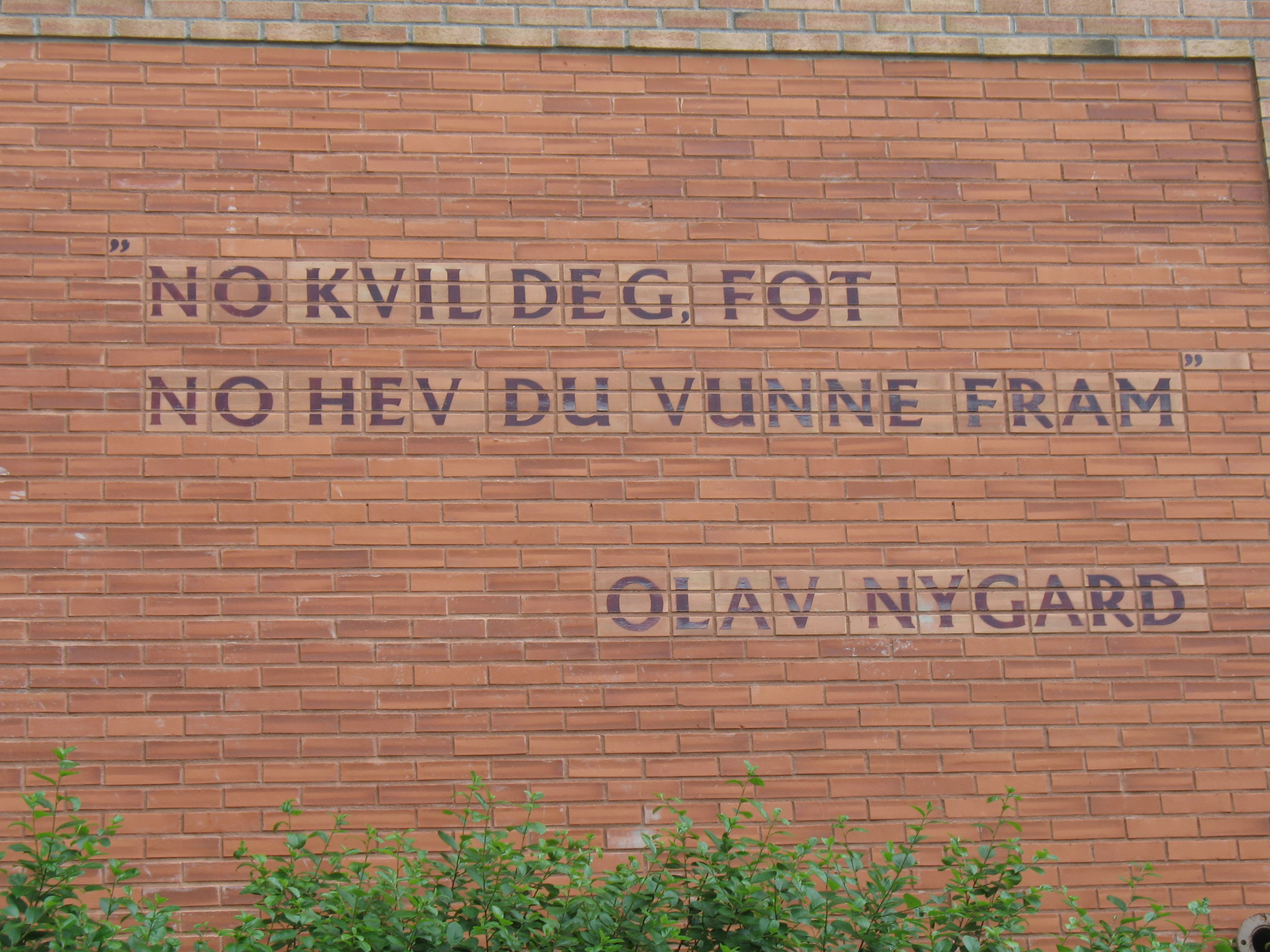 No kvil deg, fot, no hev du vunne fram – et Olav Nygard-sitat på gavlveggen i en blokk i Ulsrud Borettslag, Olav Nygards veg i Oslo